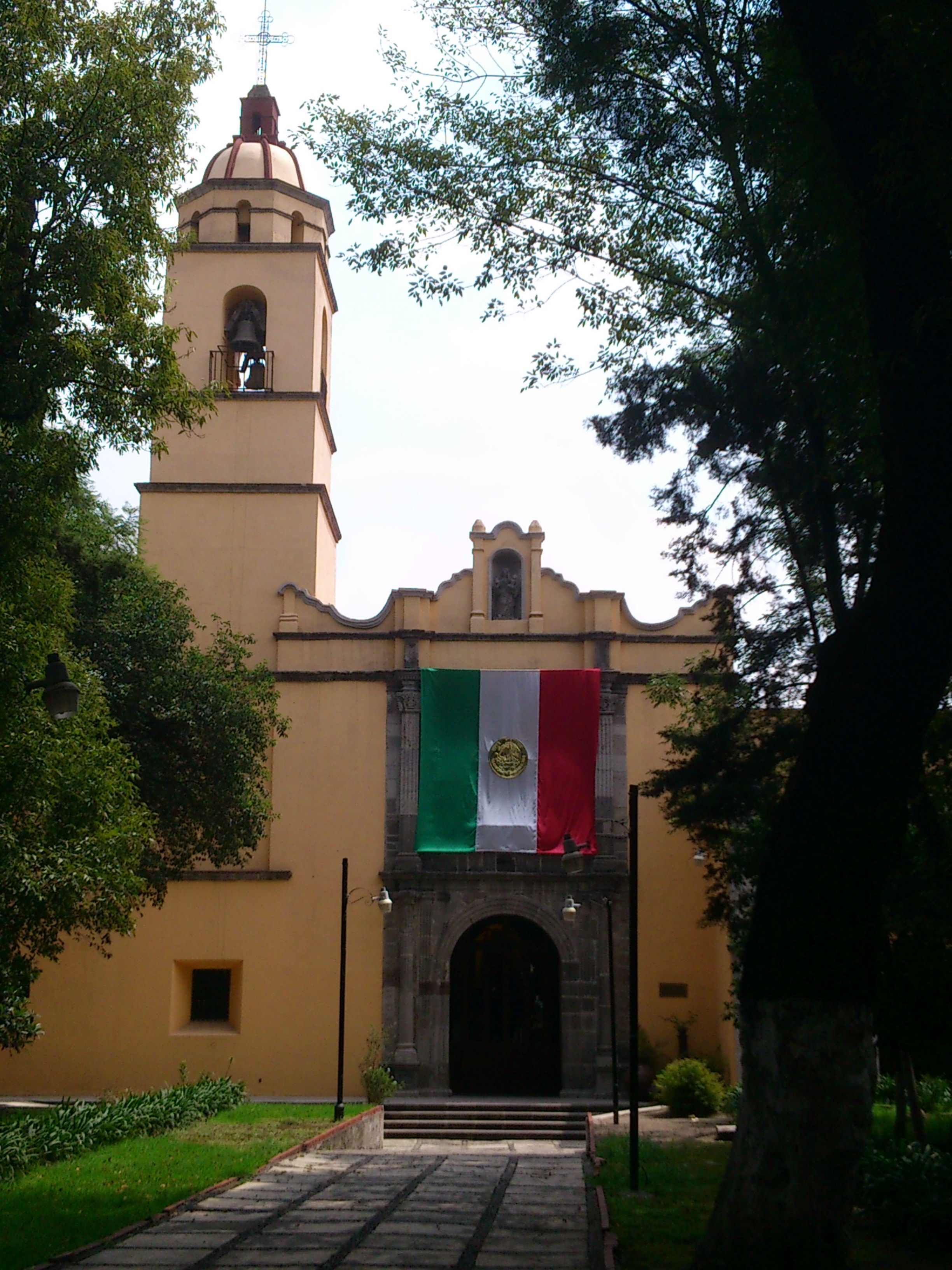 Vista del atrio de la Parroquia y Antiguo Convento de la Purificación de la Candelaria. La foto fué tomada durante las fiestas patrias de México por lo que una Bandera de México fué colocada en el retablo principal.